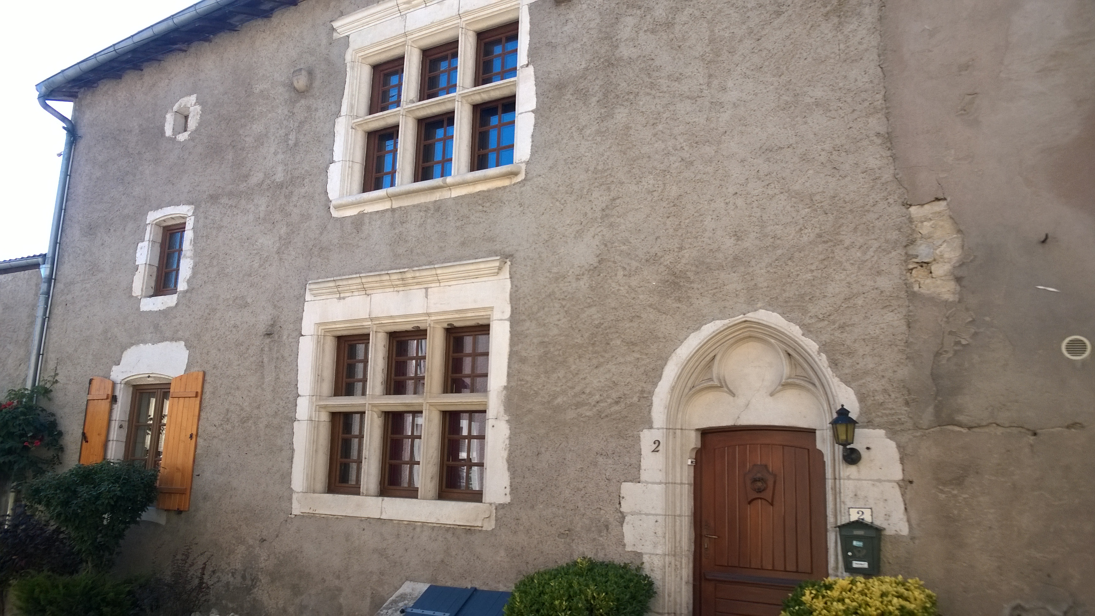 Maison Pierret du XIV et XVIème siècle au 2 rue des Loups à Pulligny (Meurthe-et-Moselle, France) .